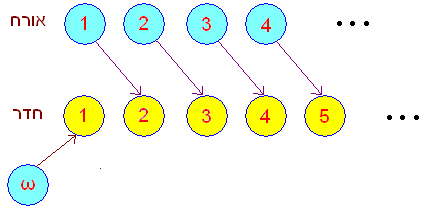 אורח חדש מגיע למלון של הילברט